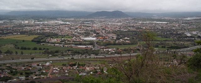 Panoramica de San Juan del rio desde el Cerro de la Venta